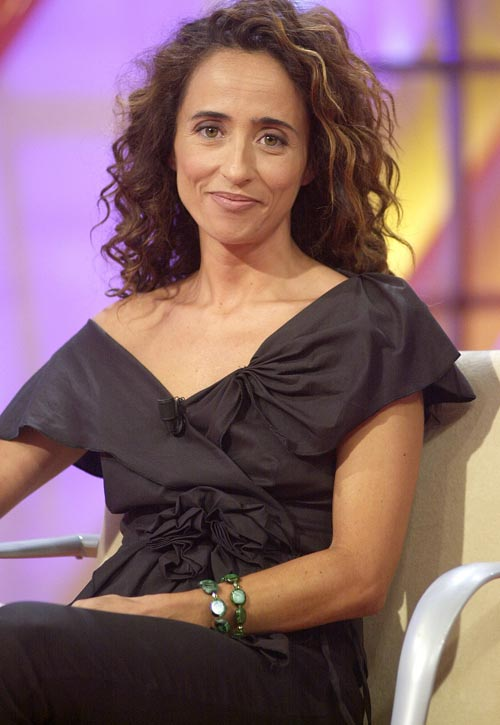 La periodista española María Patiño en una entrevista para 20 Minutos.